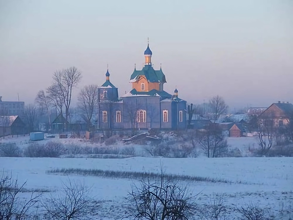 Царква Успення Прасвятой Багародзіцы 1639 г, перабудавана ў 1912 г.